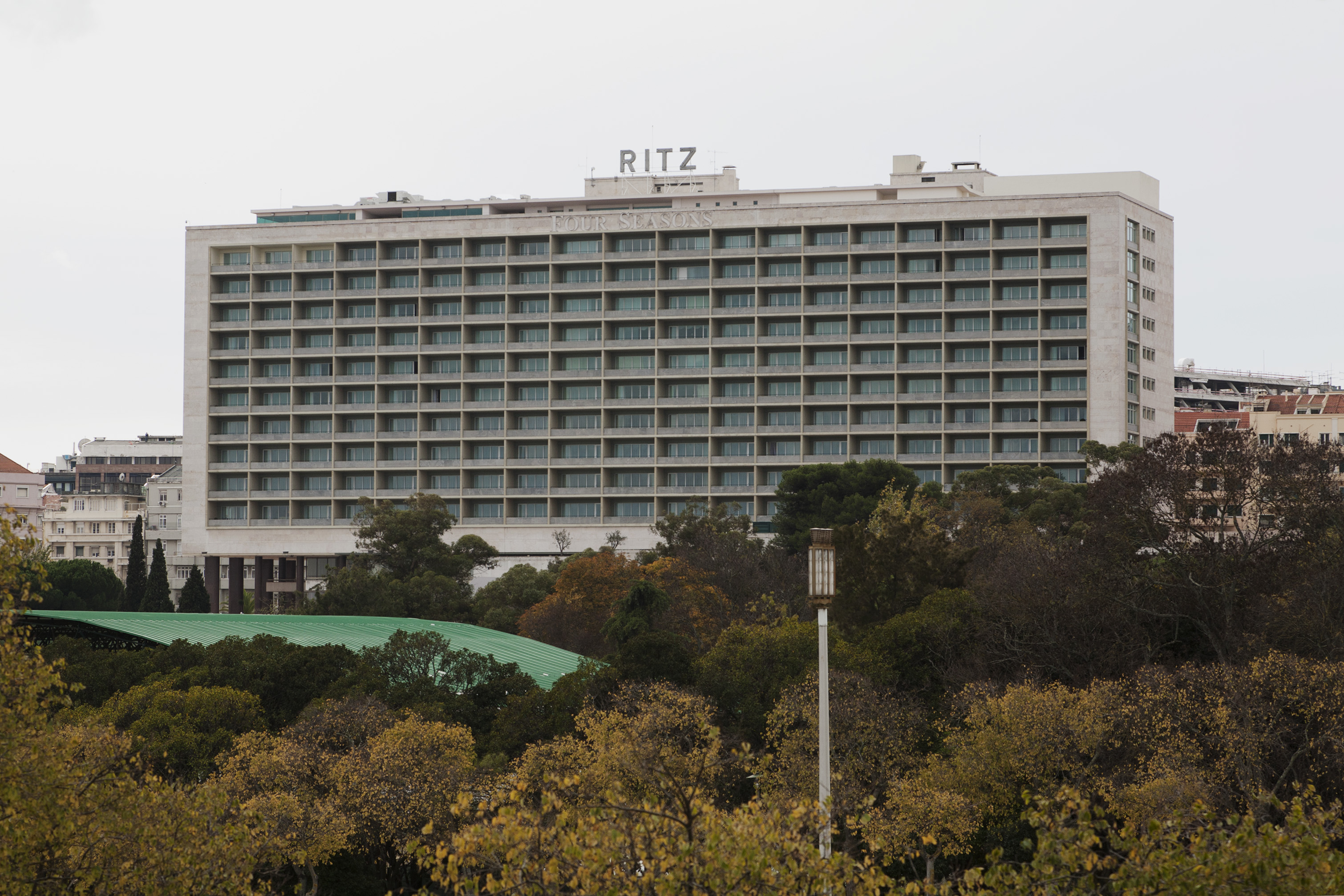 Hotel Ritz (Four Seasons), Lisboa, 2012; Arq. Porfírio Pardal Monteiro